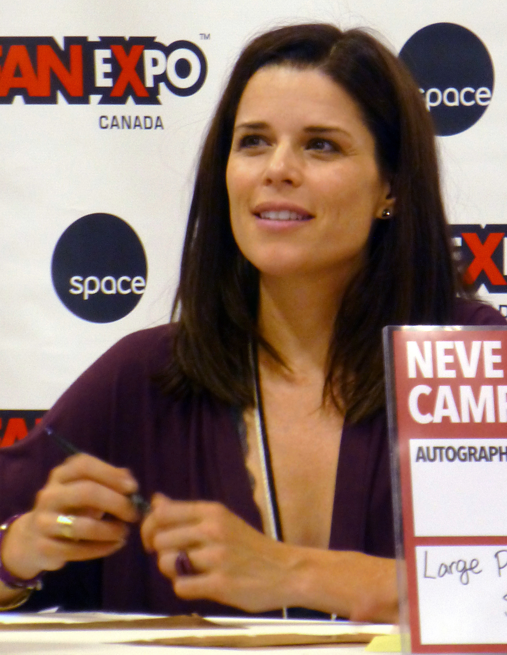 Neve Campbell 04